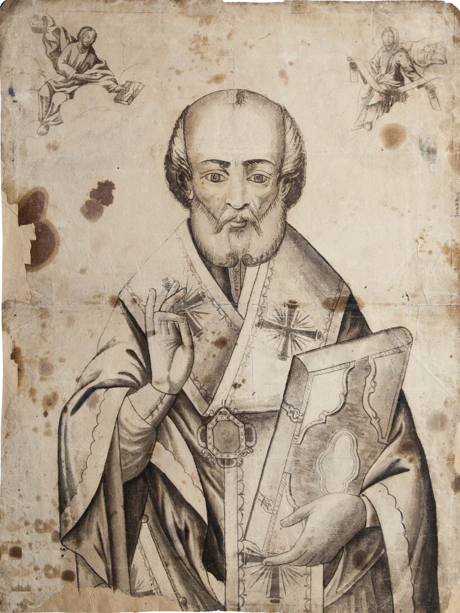 Nicolae Teodorescu (1786–1880) – Sfântul Nicolae 46,9x35,8 cm, tuș pe hârtie, începutul secolului XIX